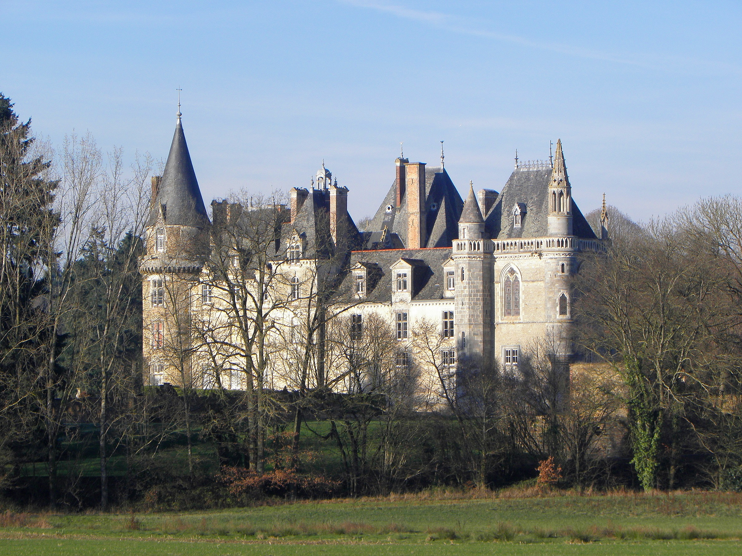 Façade sud du château du Plessis en Argentré-du-Plessis (35).